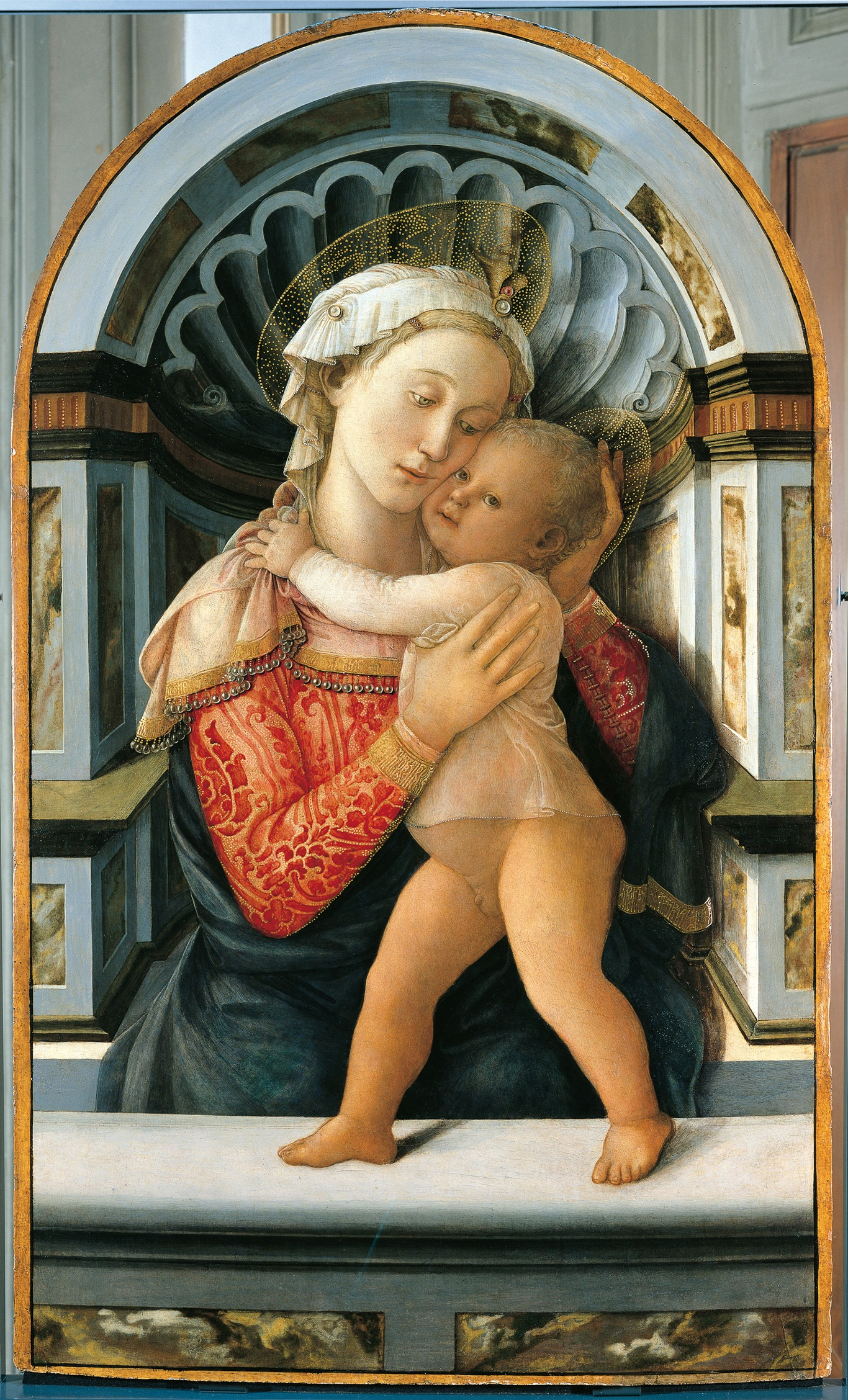 Filippo Lippi, Madonna col Bambino, pala lignea conservata nel Palazzo Medici Riccardi a Firenze.